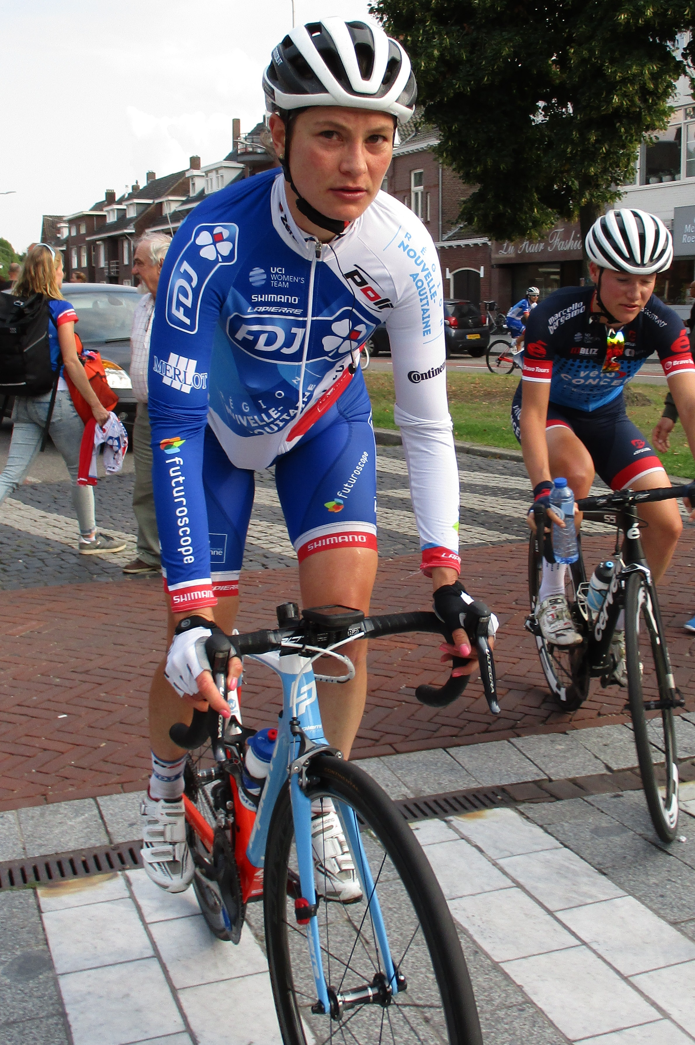 4e etappe van de Boels Ladies Tour 2017 door Noord-Limburg, finish in Weert.